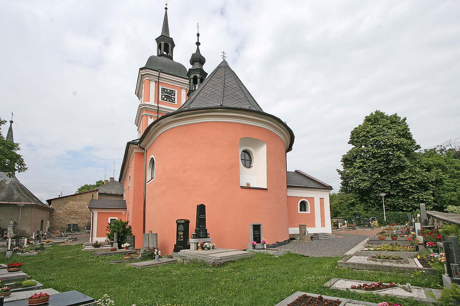 kostel svatého Víta v Makově